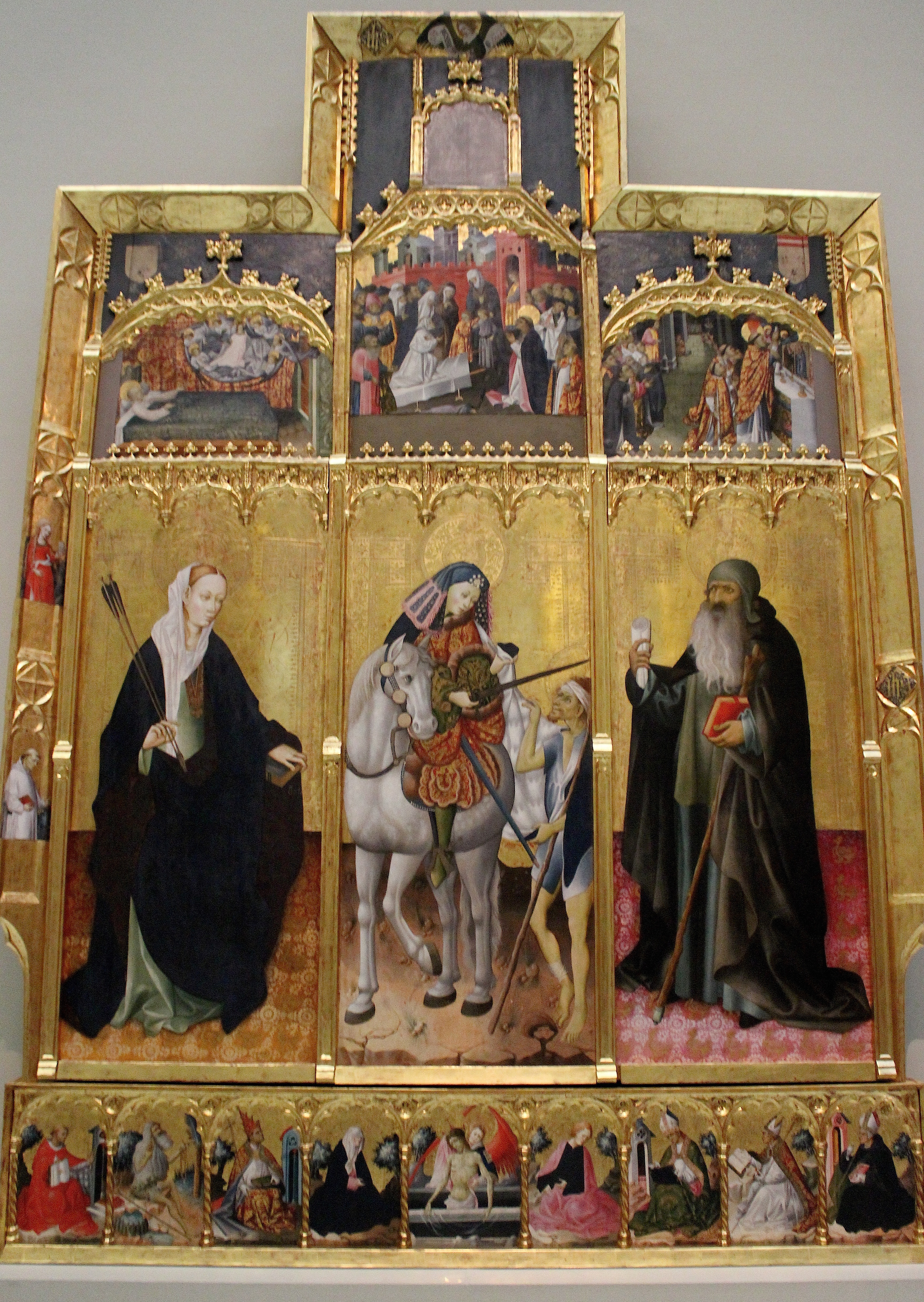 Esta obra, llamada el Retablo de San Martín, Santa Úrsula y San Antonio Abad, procede de la Cartuja de Porta Coeli y debió ser realizada aproximadamente entre 1437 y 1440.